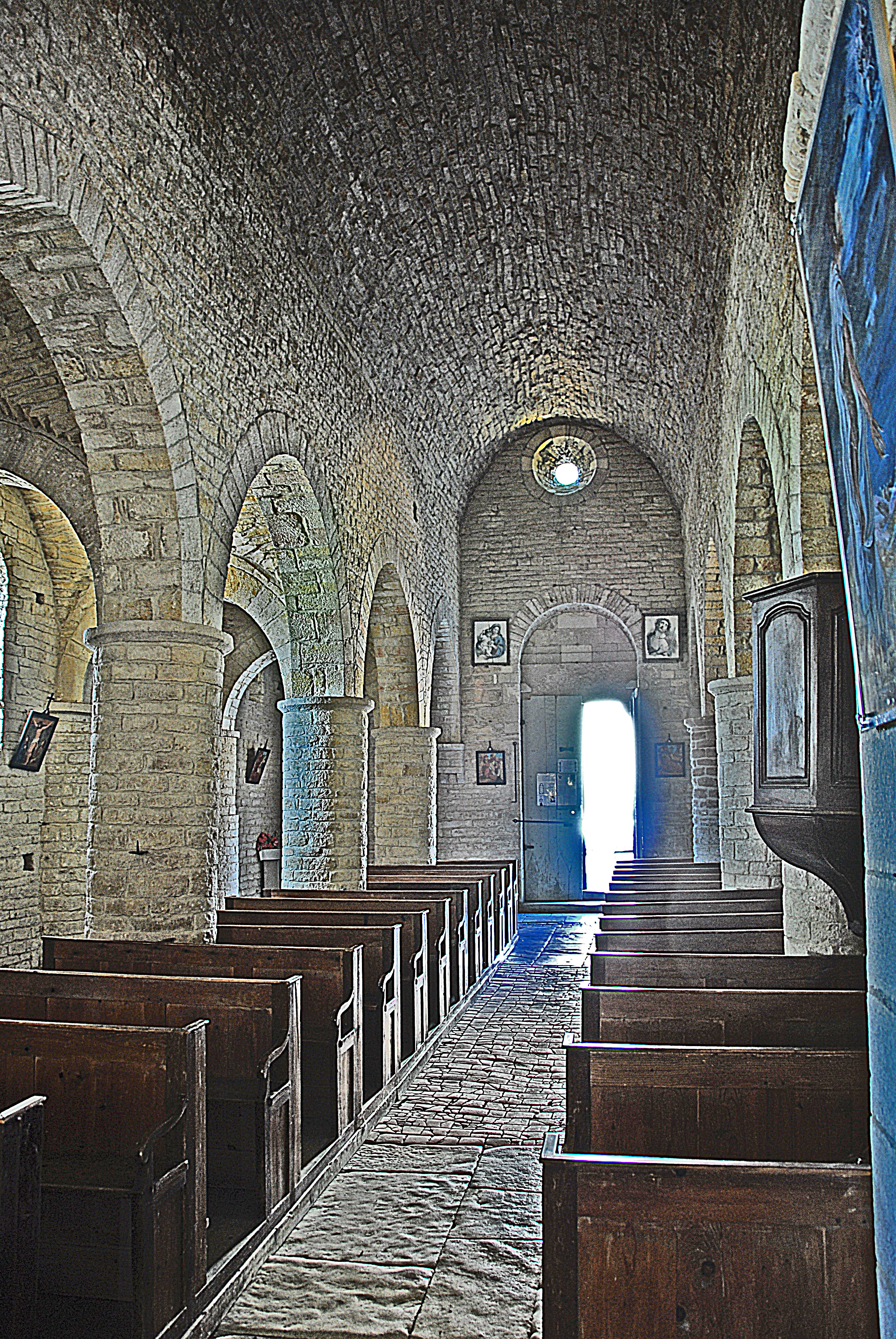 St-Bathélémy, Farges, Mittelschiff nach hinten